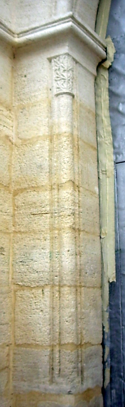 Antic edifici de l'Hospital (Alcoi). Capitell romànic.